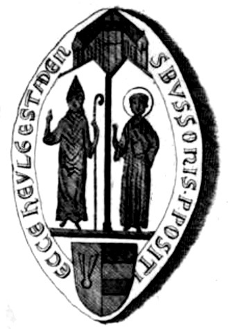 Nachzeichnung eines Abdrucks des Siegels des Propstes vom St. Martinstift in Heiligenstadt auf einer Urkunde von 1355 ([1]). Randbeschriftung: S[IGILLVM] BUSSONIS P[RAE]POSITI ECC[LESI]E HEYLGESTADEN[SIS] - "Siegel des Busso, Propst der Kirche in Heiligenstadt". (abgegildet sind vermutlich die beiden Heiligen Aureus und Justinus)